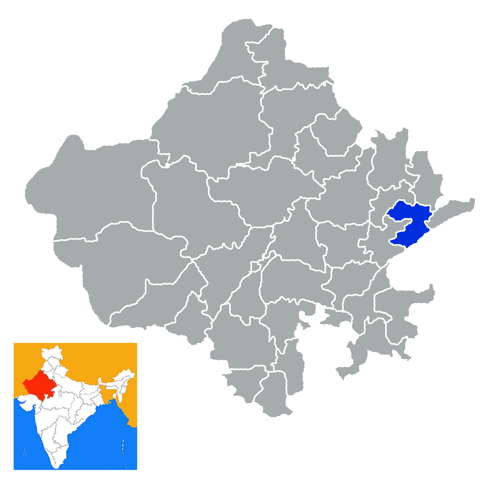 Distrityo de Sawai Madhopur Rajastan India